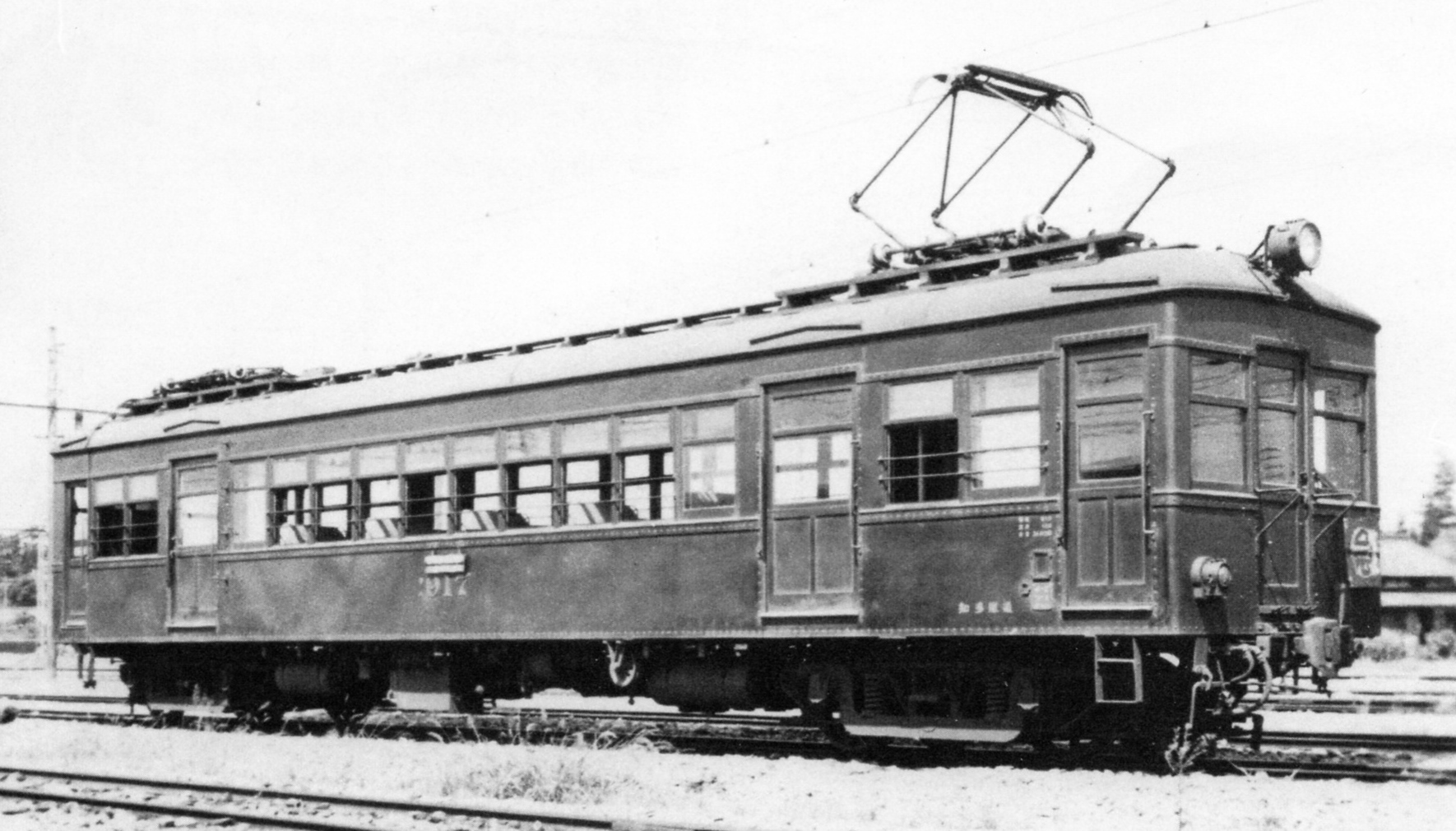 知多鉄道デハ917